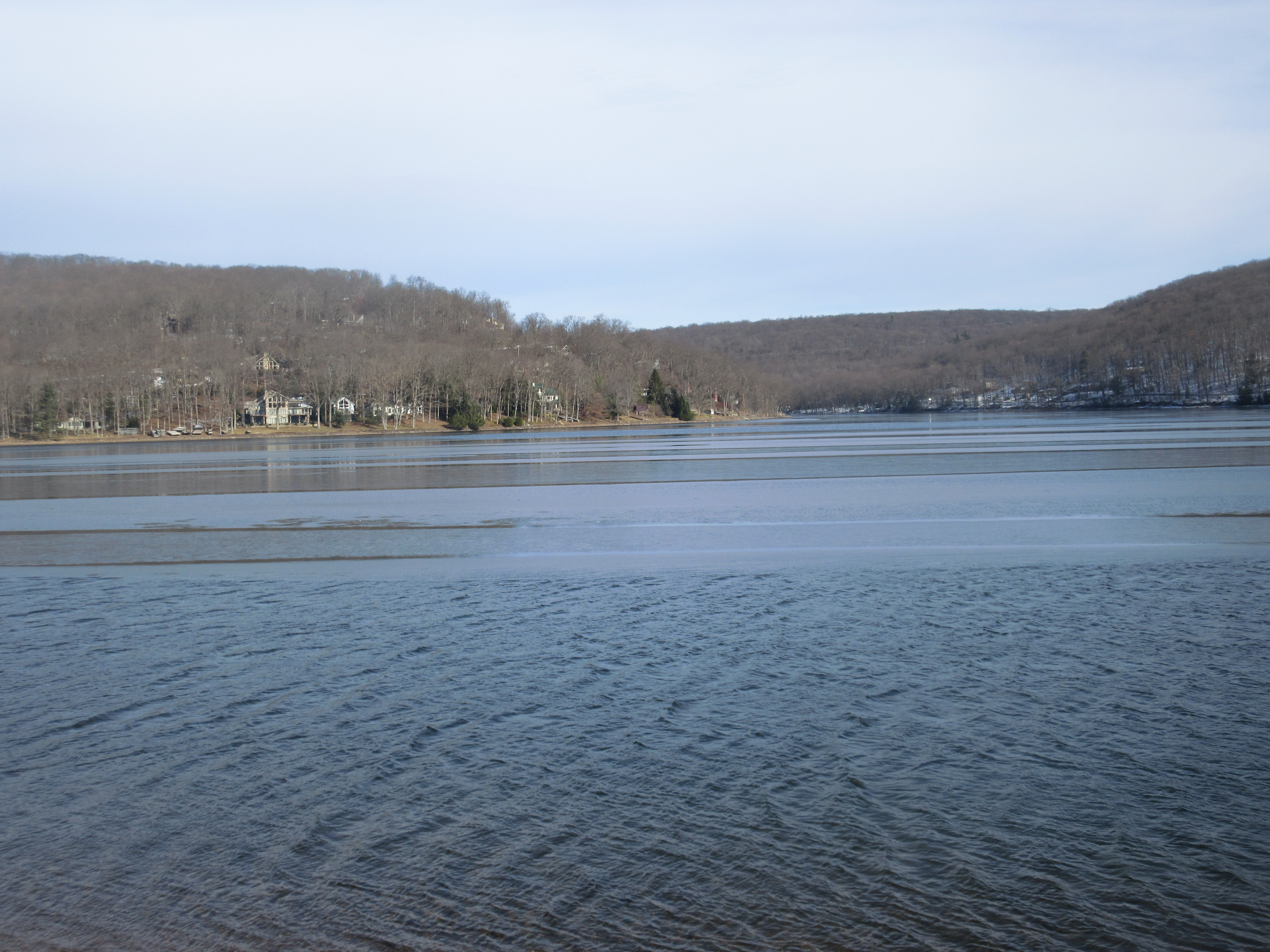 Depicted place: Deep Creek Lake